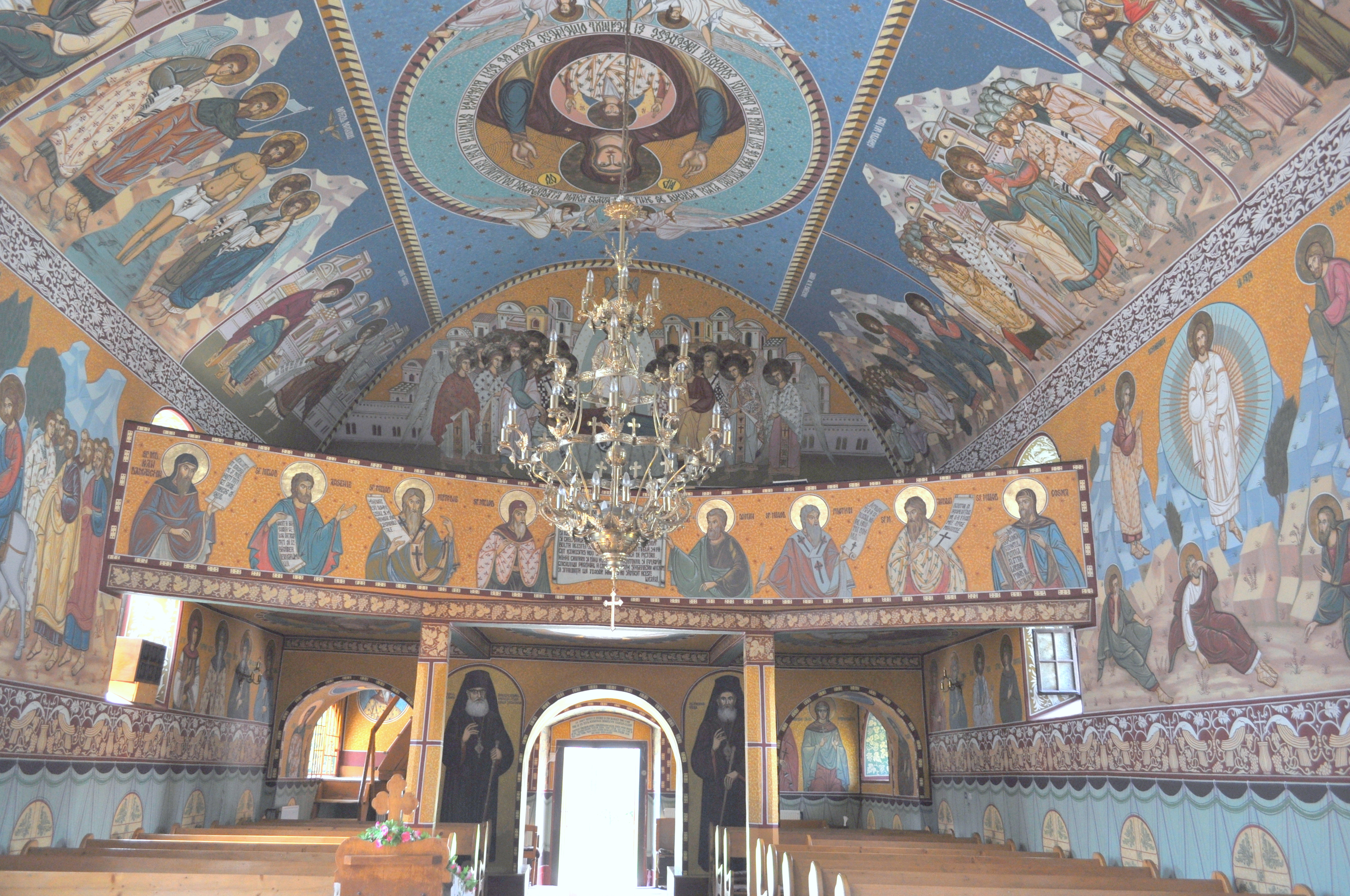 Biserica ortodoxă „Sf. Arhangheli Mihail și Gavriil”, sat Feldru; comuna Feldru